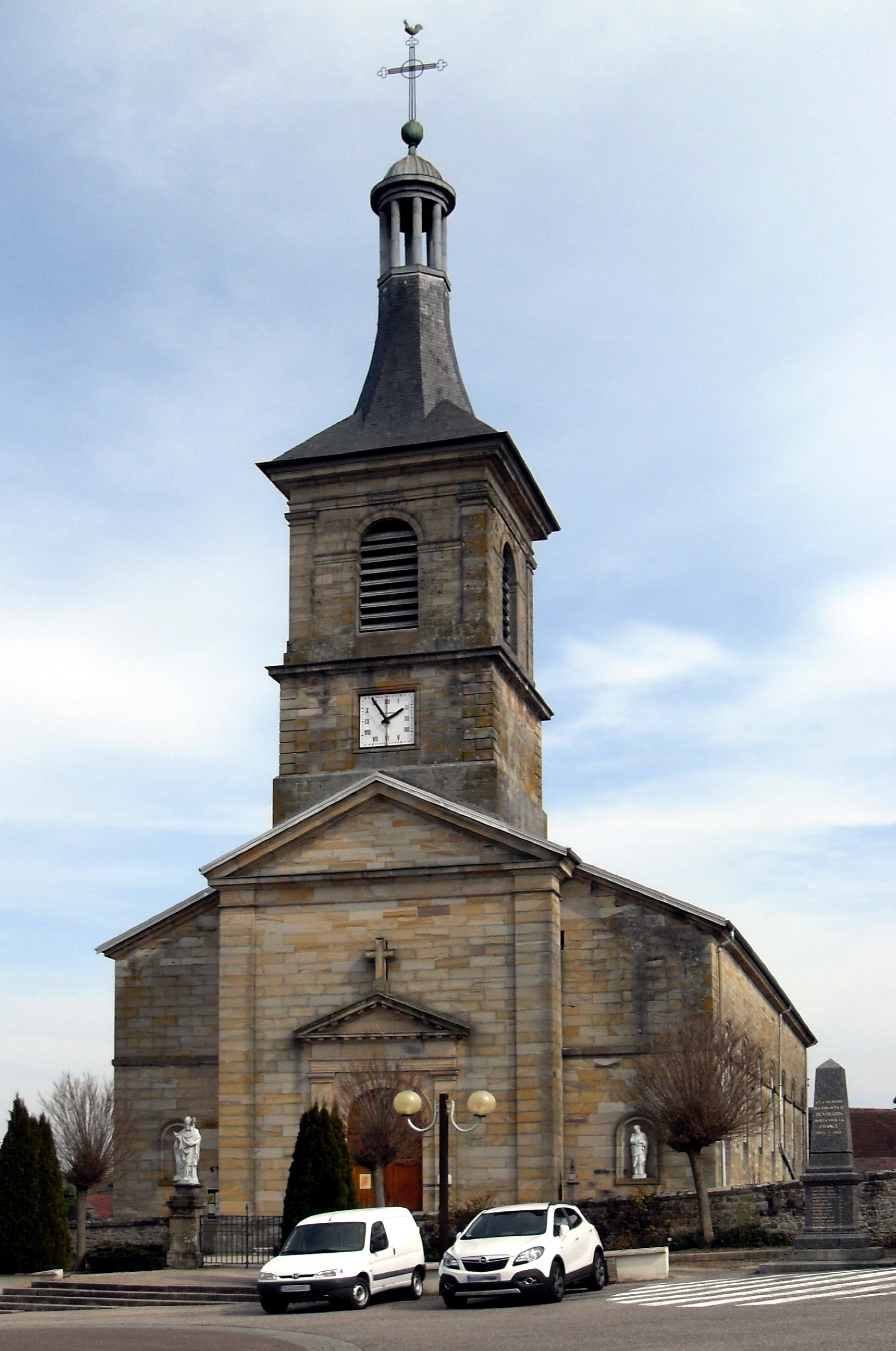 L'église Saint-Jean-Baptiste à Deyvillers